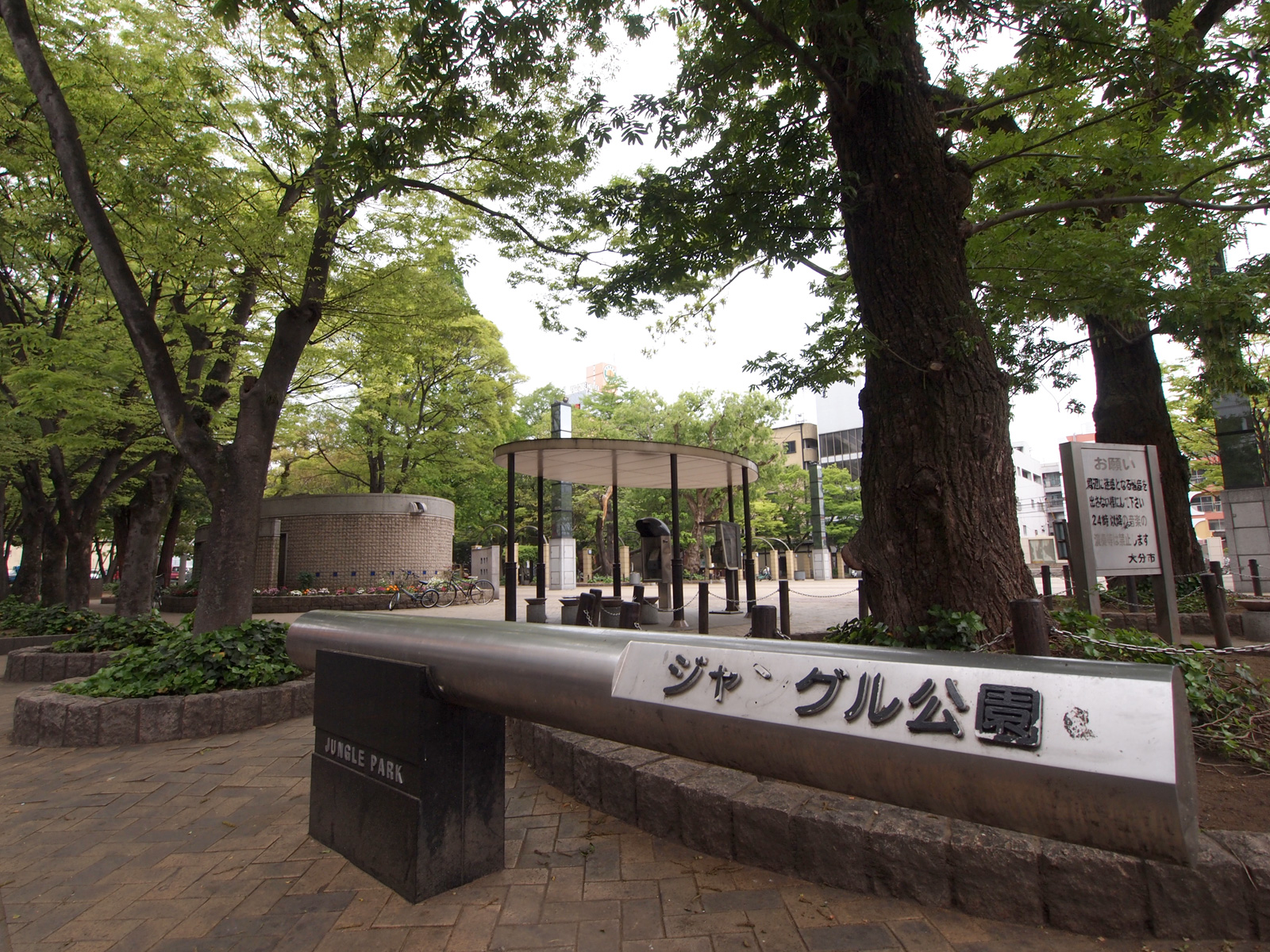 ジャングル公園（大分県大分市）